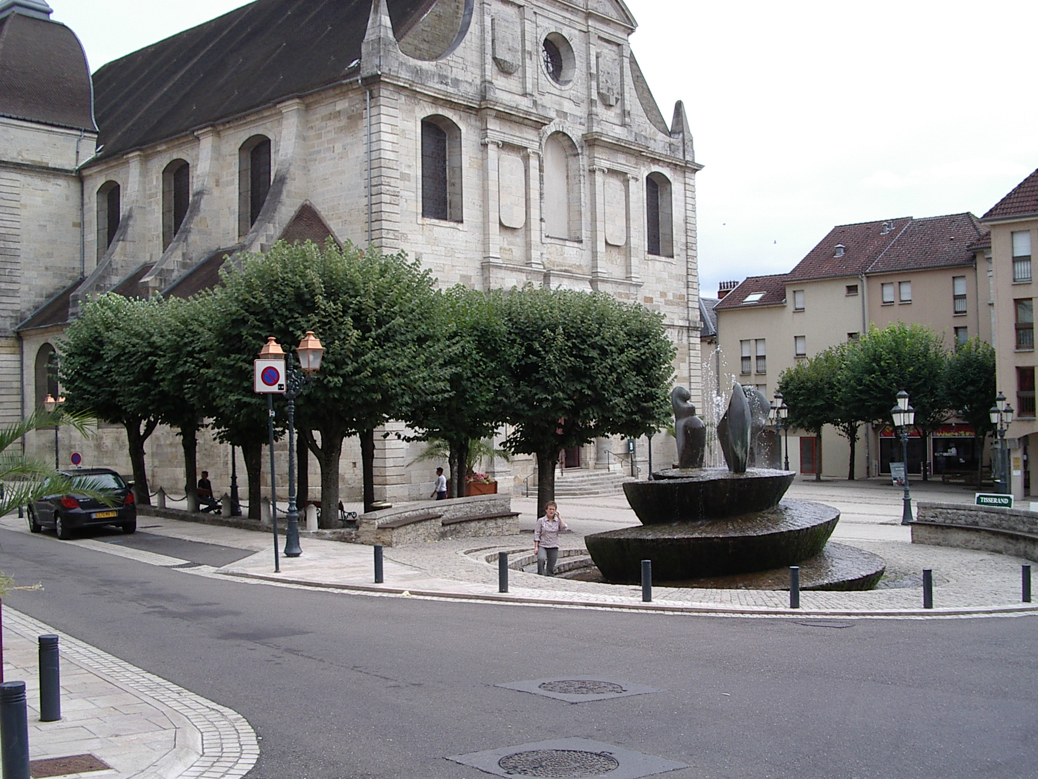 Vue de l’église et la fontaine, Vesoul (Haute-Saône).